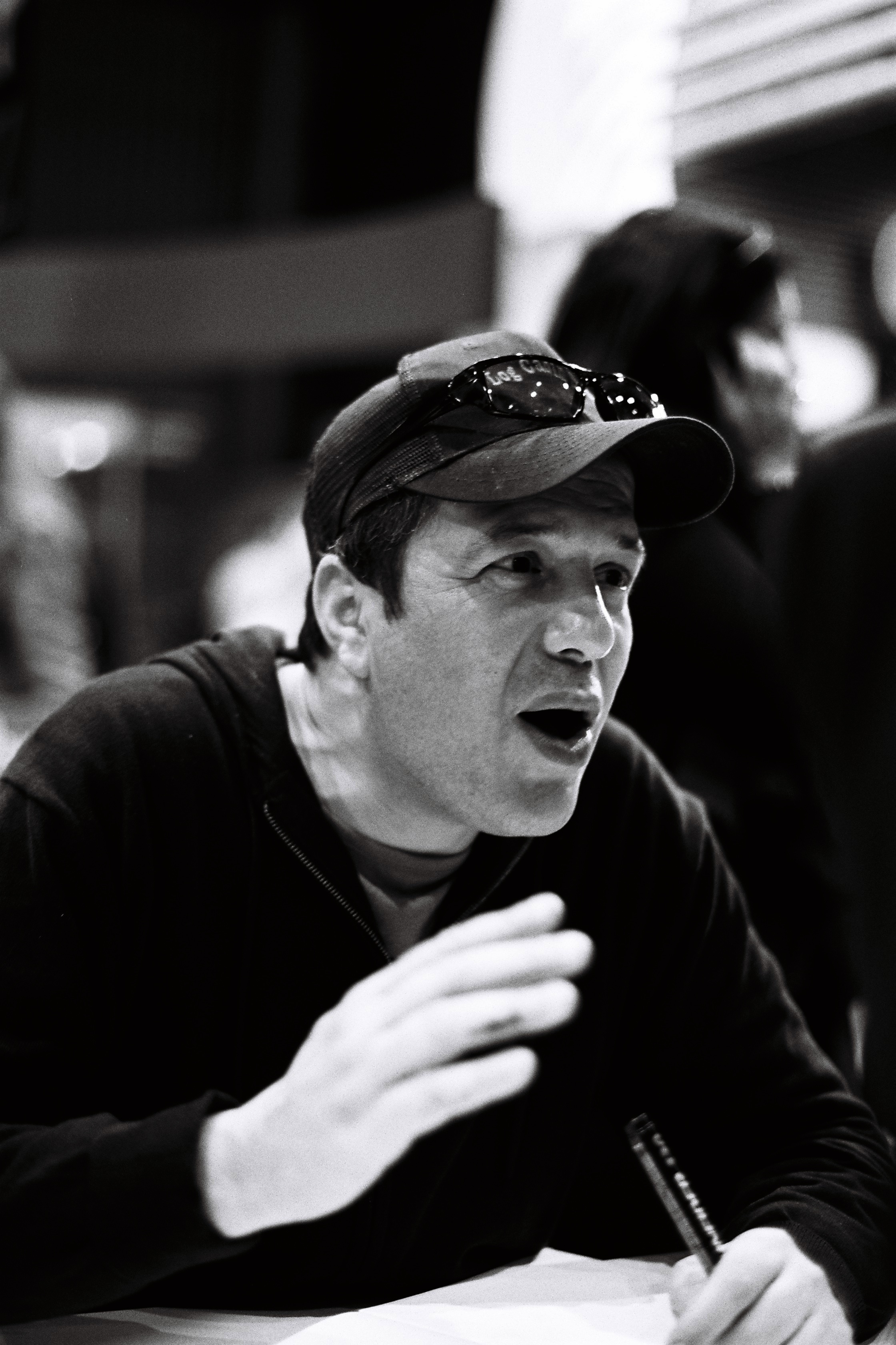 Ali Dilem au salon du livre de Paris 2012